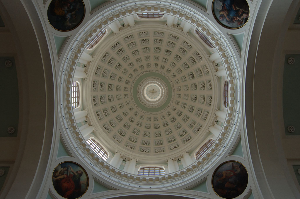 Urbino, Marche, Italia